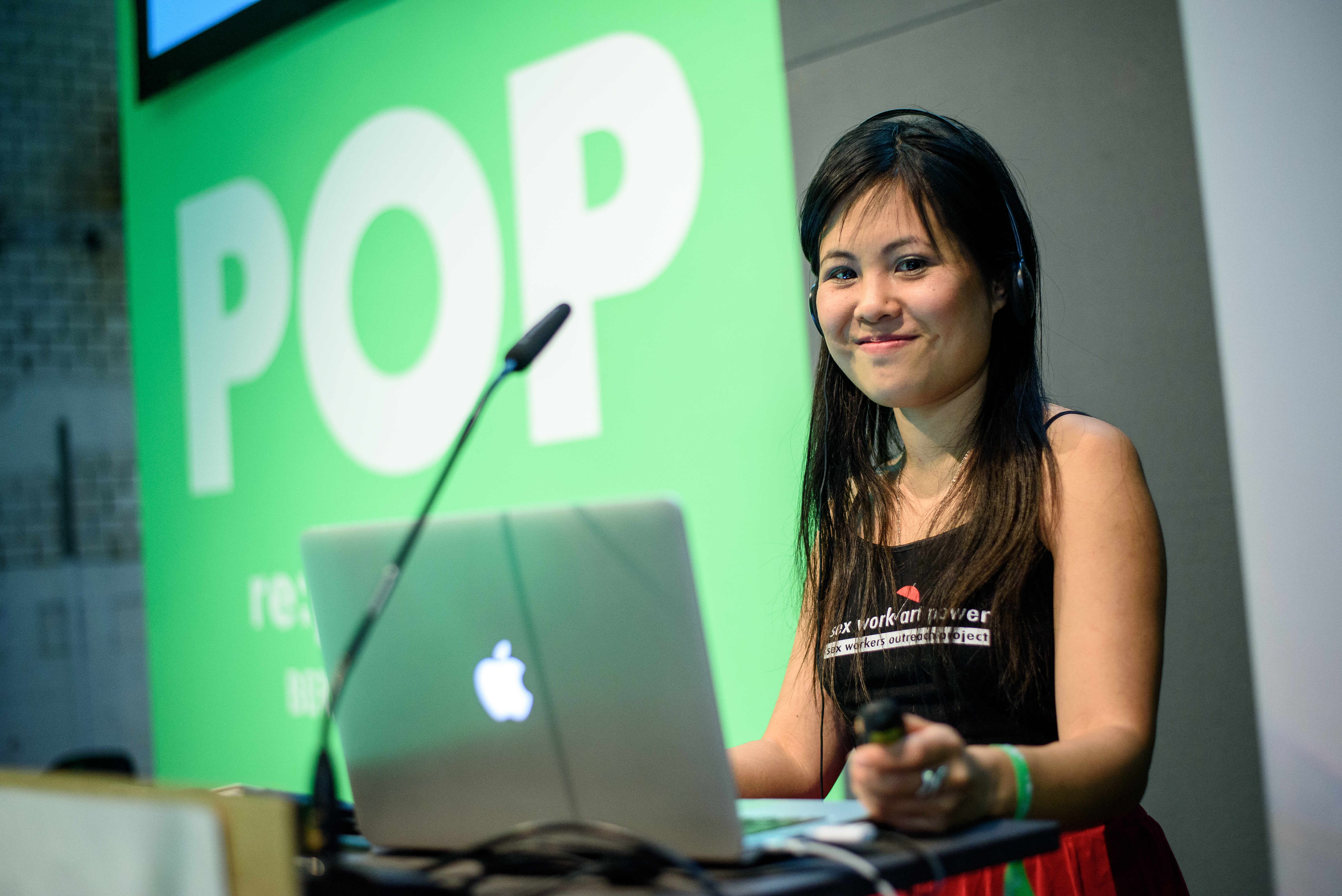 04.05.2018, Berlin: Talk: Live Nude Girls: Feminist Art & Sex Work in the Digital Age Speaker: Lena Chen Die re:publica ist eine der weltweit wichtigsten Konferenzen zu den Themen der digitalen Gesellschaft und findet in diesem Jahr vom 02. bis 04. Mai in der STATION-Berlin statt. Foto: Gregor Fischer/re:publica